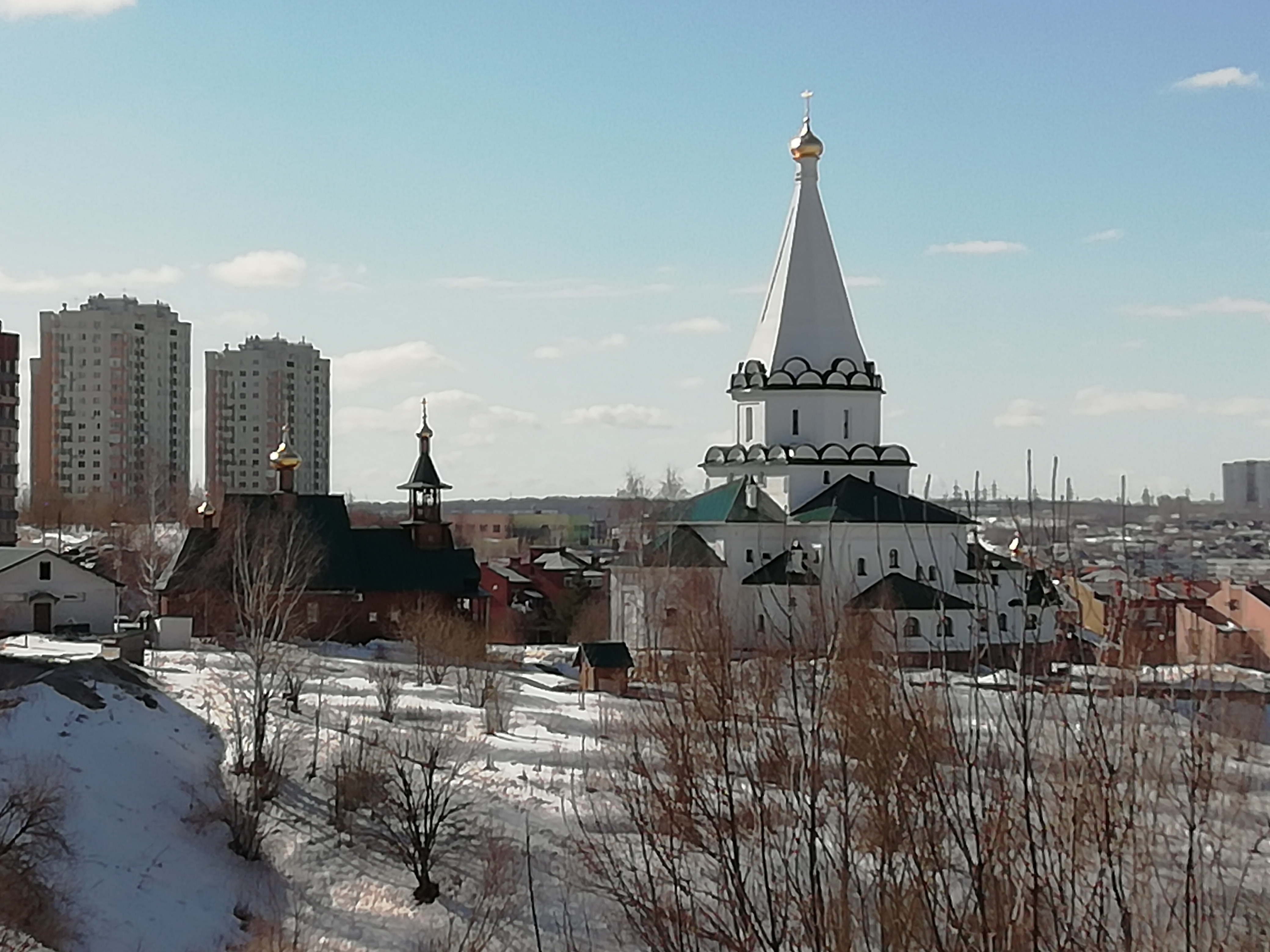 Церкви во имя святого князя Игоря Черниговского и равноапостольной княгини Ольги, Нижний Новгород, ул. Верхне-Печёрская, д. 8а